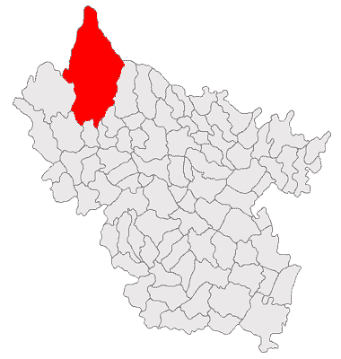 Categorie:Hărţi ale judeţului Buzău